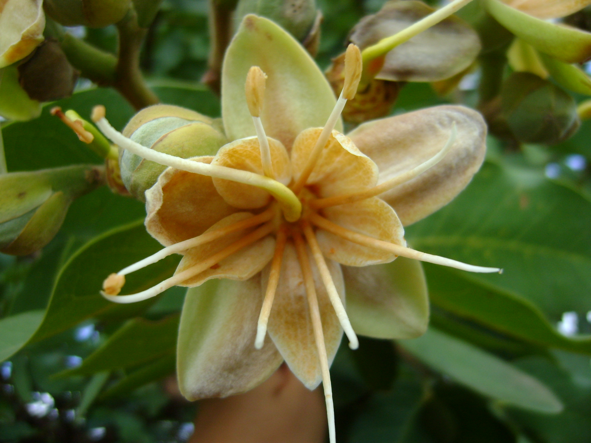 Flor de Jatobá-do-Cerrado, Hymenaea stigonocarpa Mart. ex Hayne.